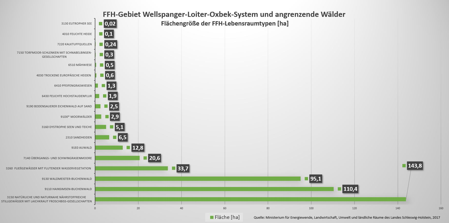 Grafik Lebensraumtypen im FFH-Gebiet Wellspangert-Loiter-Oxbek-System und angrenzende Wälder